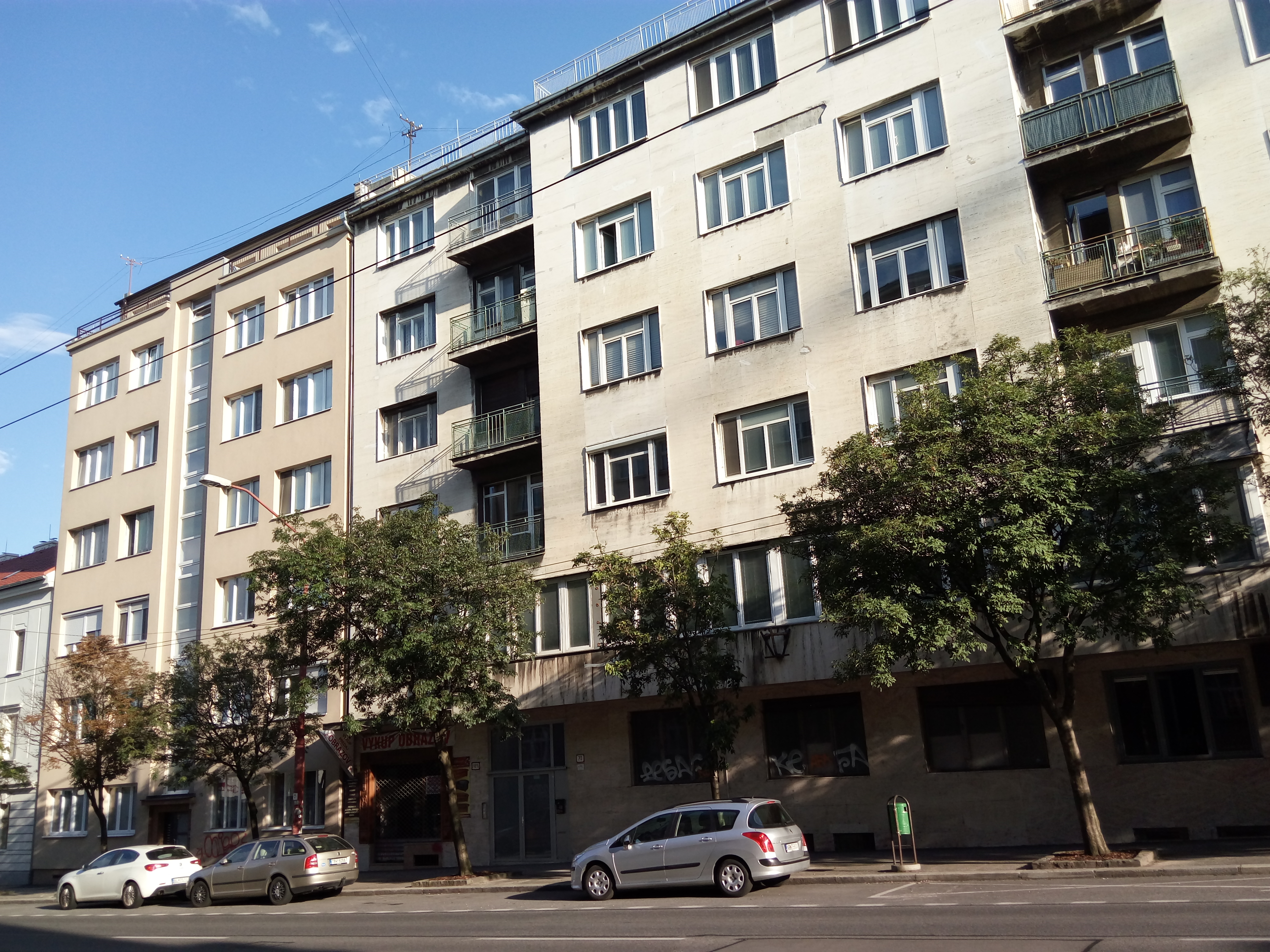 Šancová 70, Staré Mesto, Bratislava